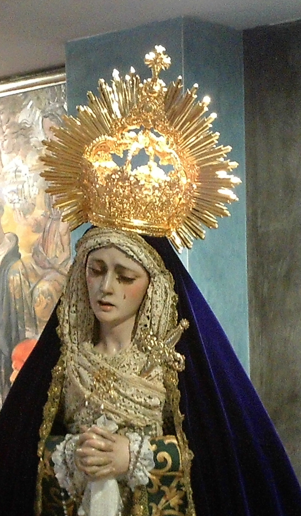 Virgen del Desconsuelo y Visitación. Iglesia de Nuestra Señora del Buen Aire. Sevilla, Andalucía, España.